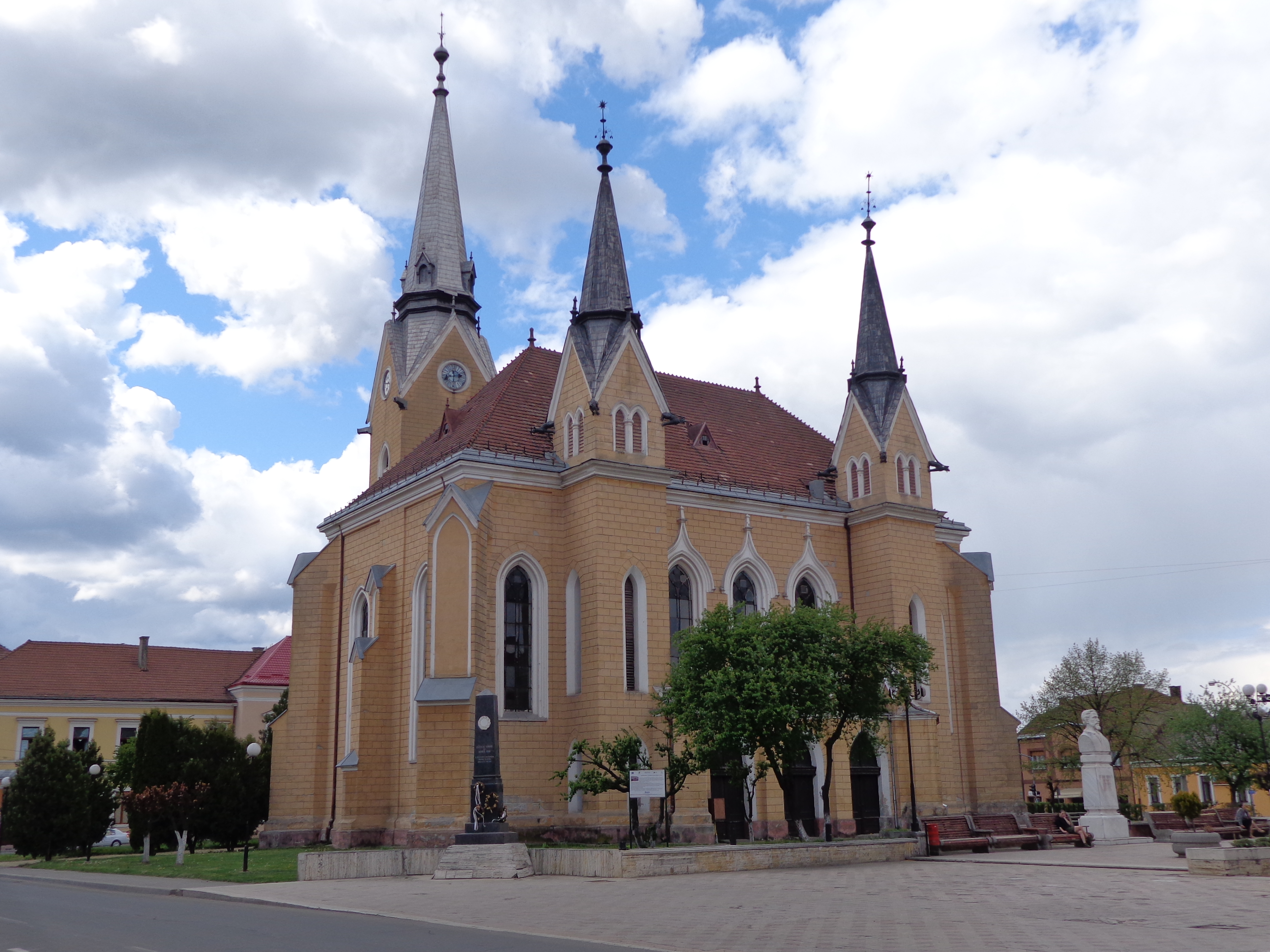 Biserica reformata de astazi a fost finalizata in anul 1892, iar ultimele modificari ale turnului au fost aduse in anul 1931. Turnul bisericii, cea mai veche constructie din Sighet, mai pastreaza si astazi 15 m din vechea structura. Pe acesta se pot observa: portalul de intrare, in arc ogival cu trei nervuri; o fereastra bifora deasupra intrarii, tot in arc frant si o rozeta, deasupra ultimei, cu decoratii gotice si ea. Toate aceste elemente, avand ancadramentul sculptat din piatra, acoperite astazi de zugraveala alba, ar putea data din a doua jumatate a secolului al XIV-lea. Biserica a fost modificata si reconstruita de mai multe ori datorita actiunilor umane, naturale sau doar noilor tendinte stilistice ale vremii.